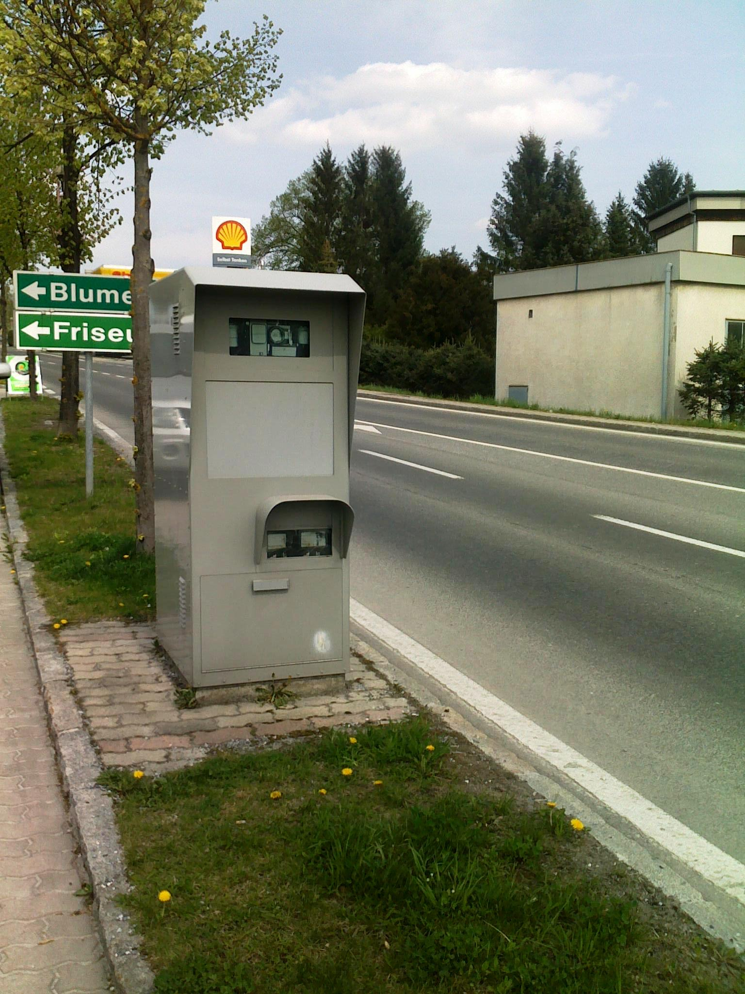 Österreichischer Radarkasten zur Geschwindigkeitsüberwachung in Köflach (Steiermark)